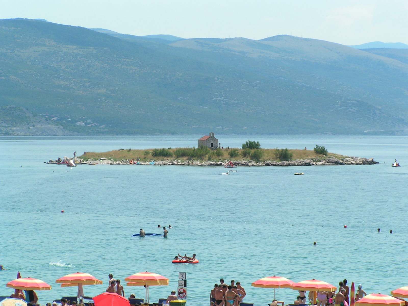 novi vinodolski - san marino island